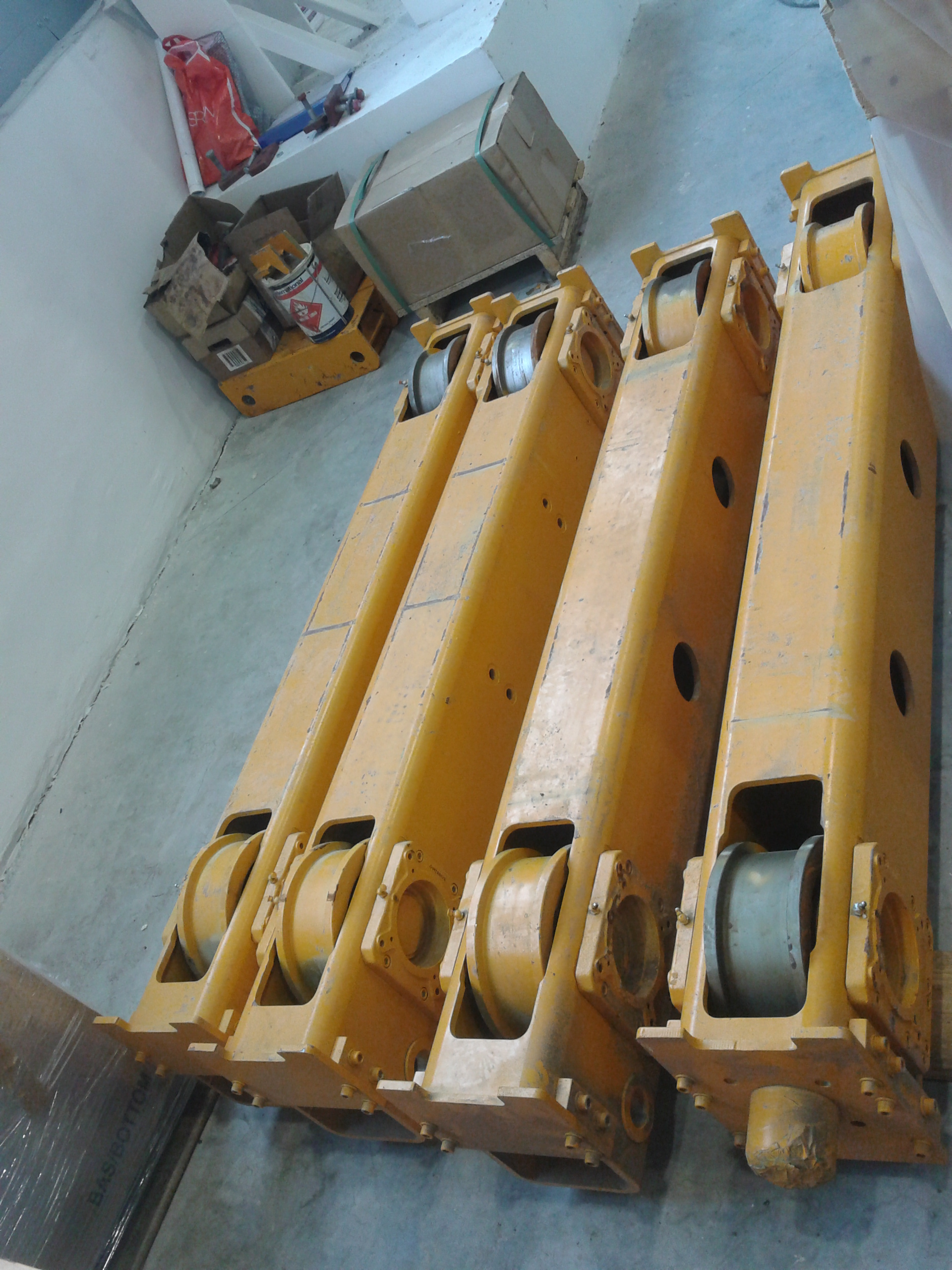 čelni nosilci za vožnjo mosta,vir mostno dvigalo 30t+30t Russia/Kaluga.